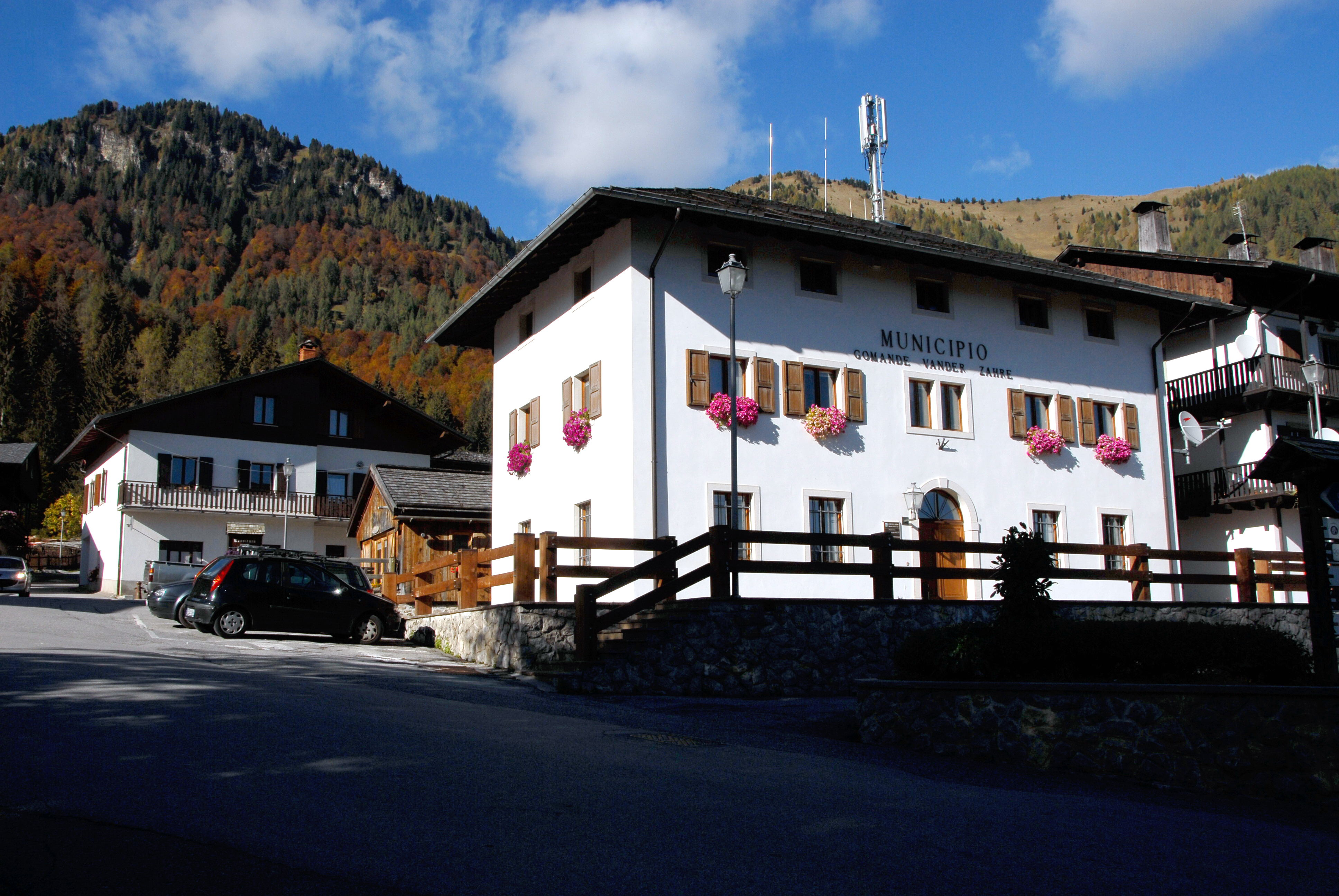 Municipal office at Sauris di sotto in the community Sauris, region Friuli Venezia-Giulia, Italy